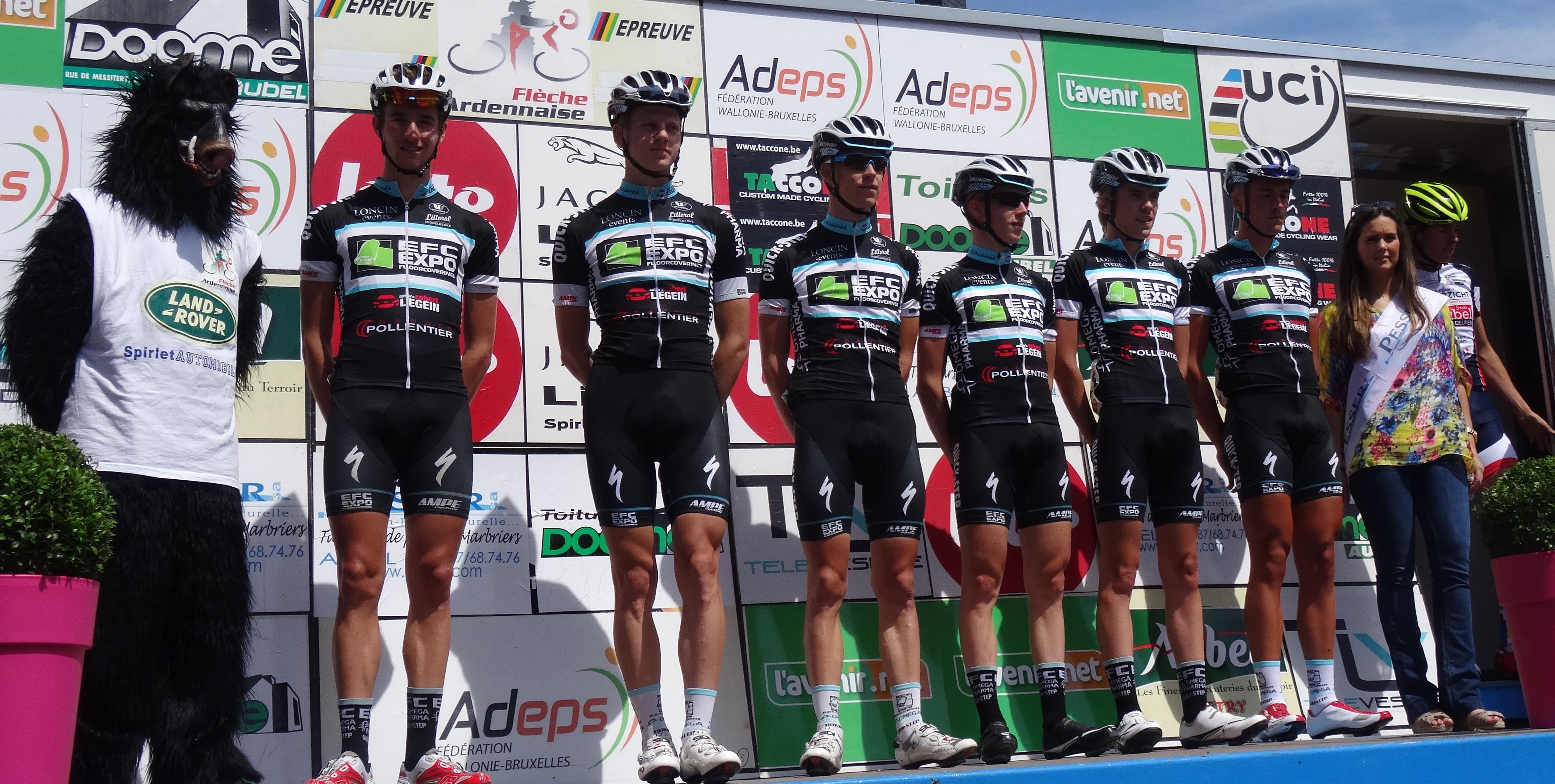 Reportage photographique réalisé le dimanche 22 juin à l'occasion du départ et de l'arrivée de la Flèche ardennaise 2014 à Herve, Belgique.